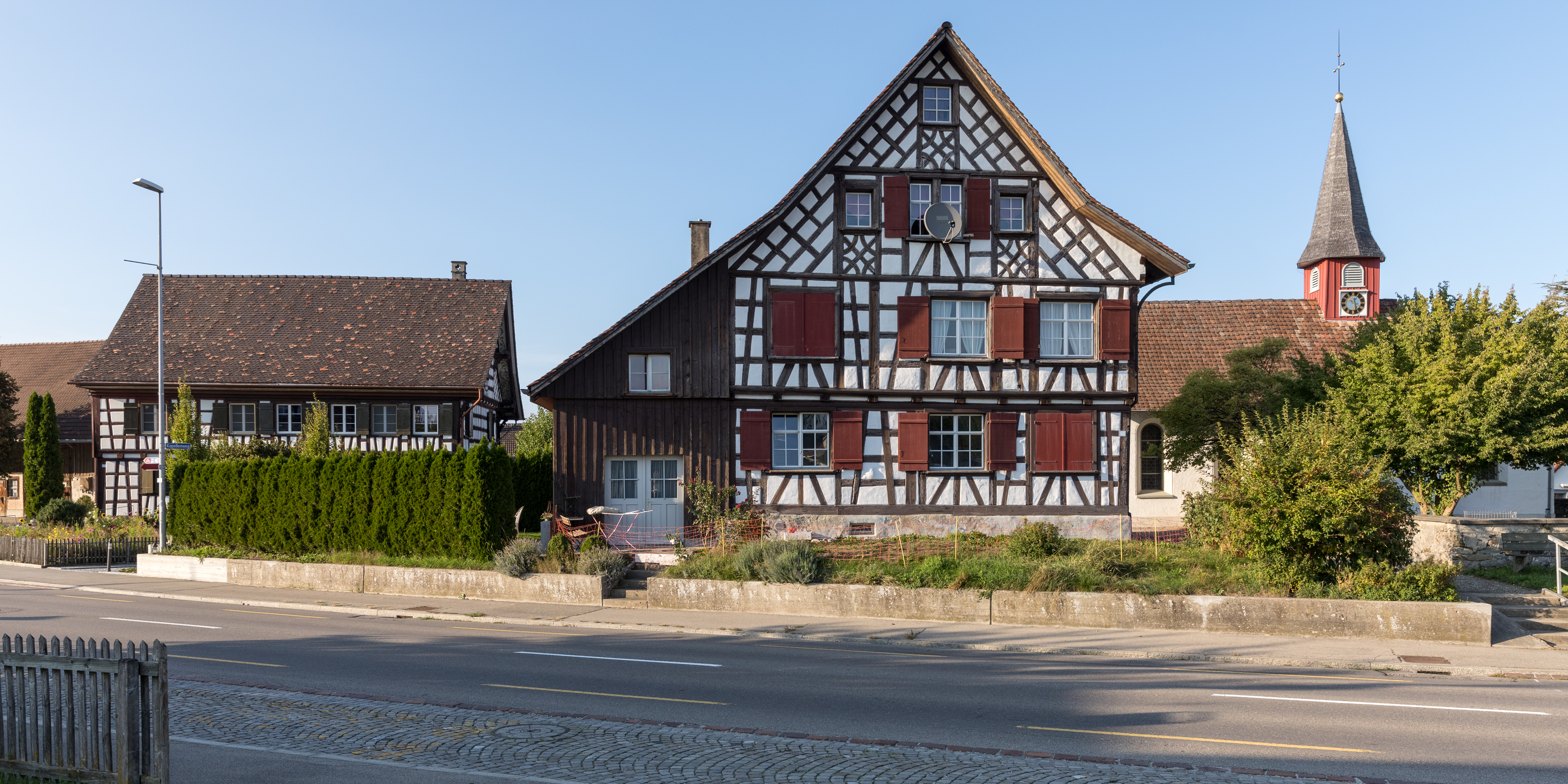 Amriswilerstrasse (66 & 64) in Steinebrunn mit Messmerhaus und Gallus-Kapelle.